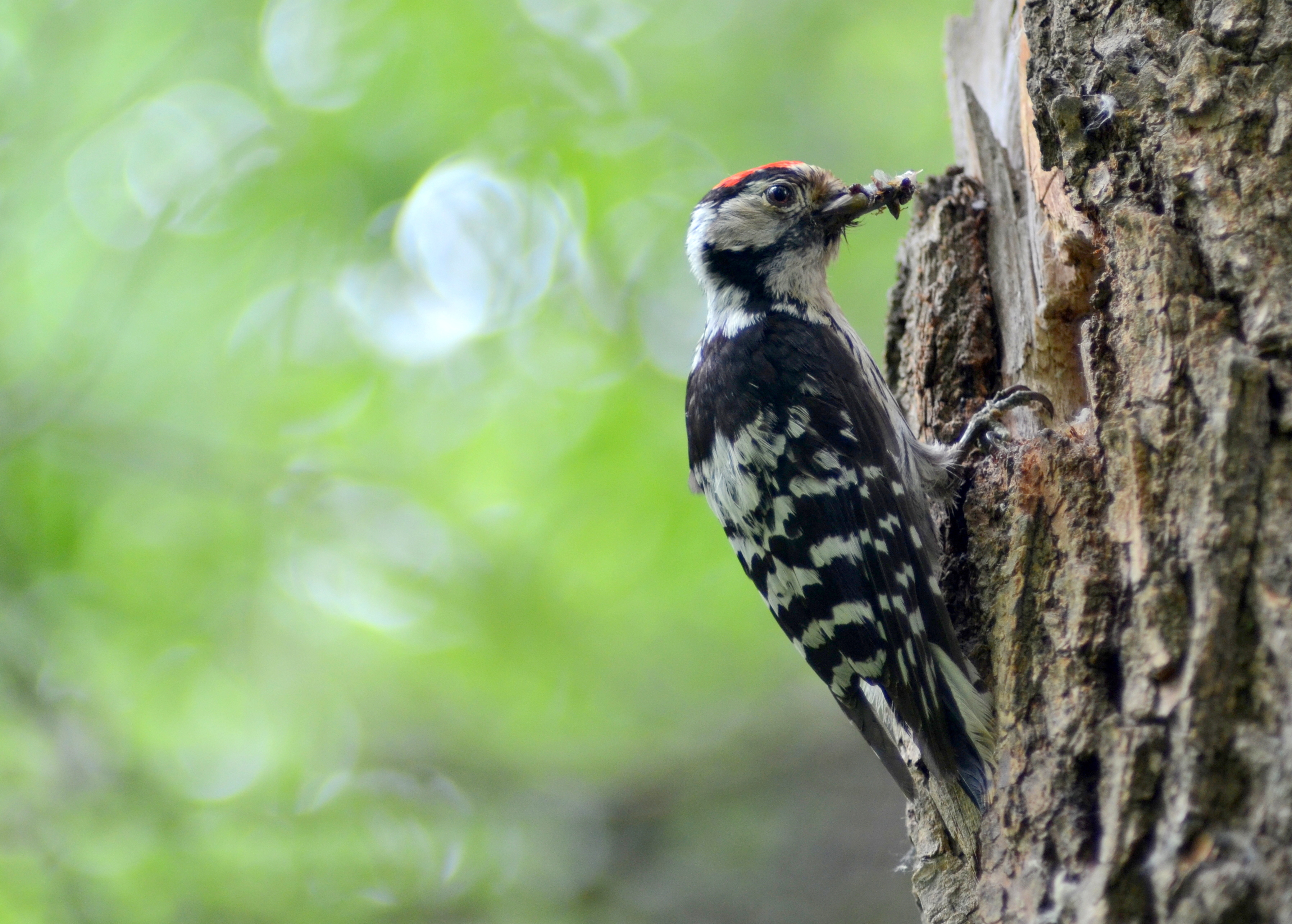 «Ізмаїльські острови», Ізмаїльський р-н, острови дельти Кілійського гирла р. Дунай: Татару, Великий Далер, Малий Далер